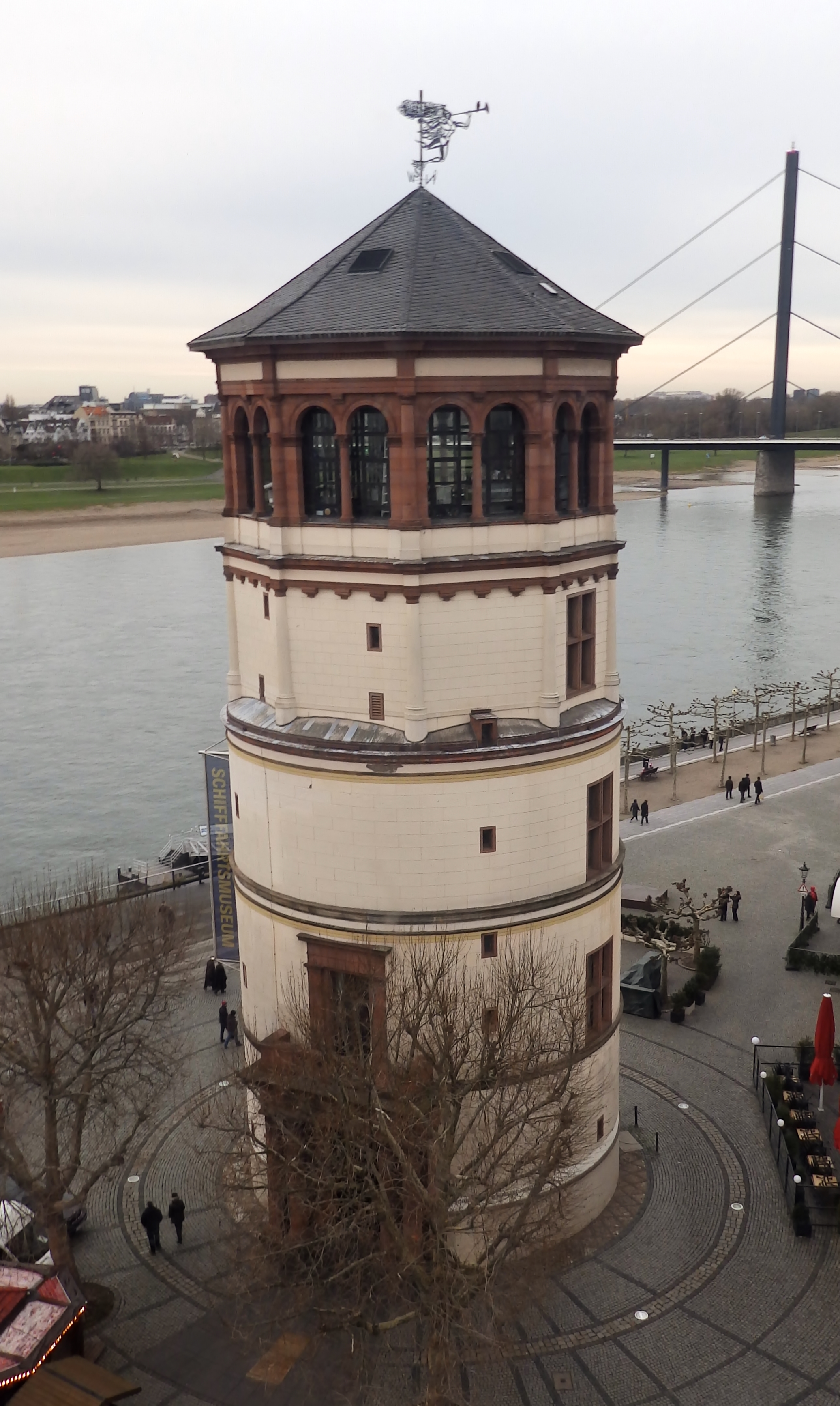 Den Schlossturm in Düsseldorf von paar Meter über dem Boden aus fotografiert